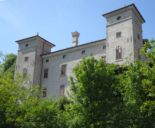 Castello di Rubbia.